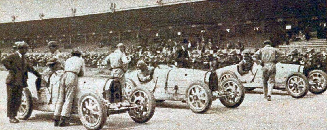 Départ du Grand Prix de l'ACF 1926 (G. à D. Constantini, de Viscaya, et J. Goux).